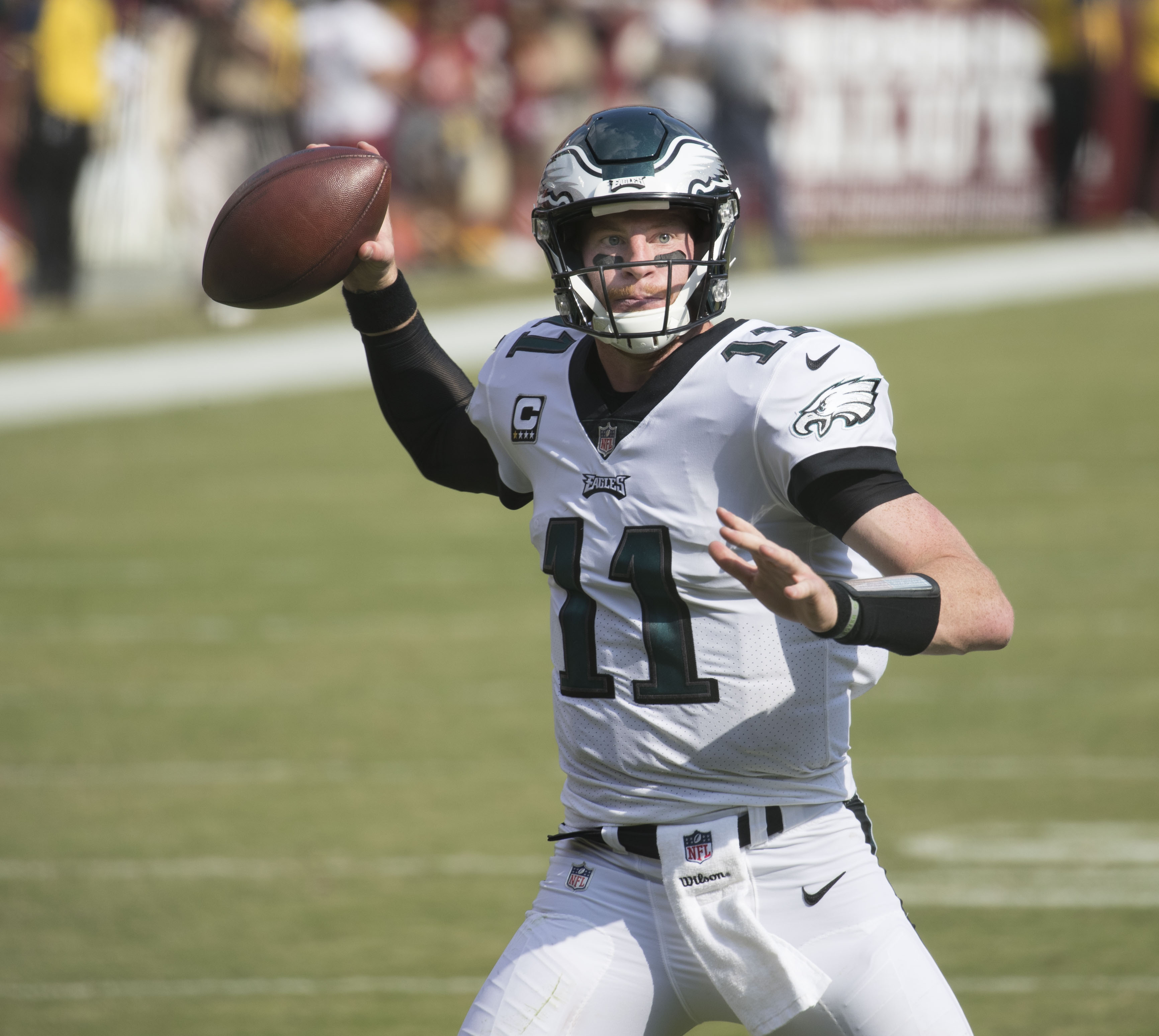 Eagles at Redskins 9/10/17